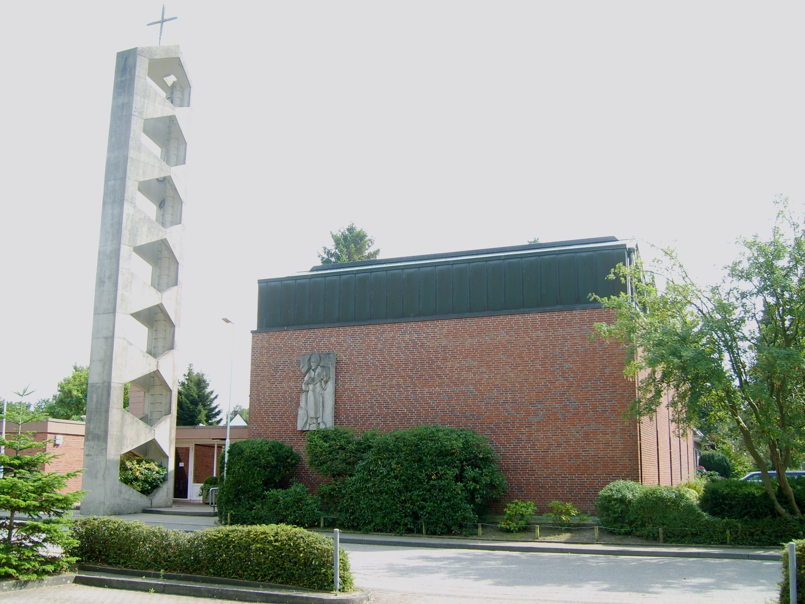 St. Bonifatiuskirche (Kronshagen)